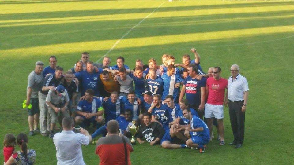 Hráči Lokomotívy Devínska Nová ves oslavujú postup.